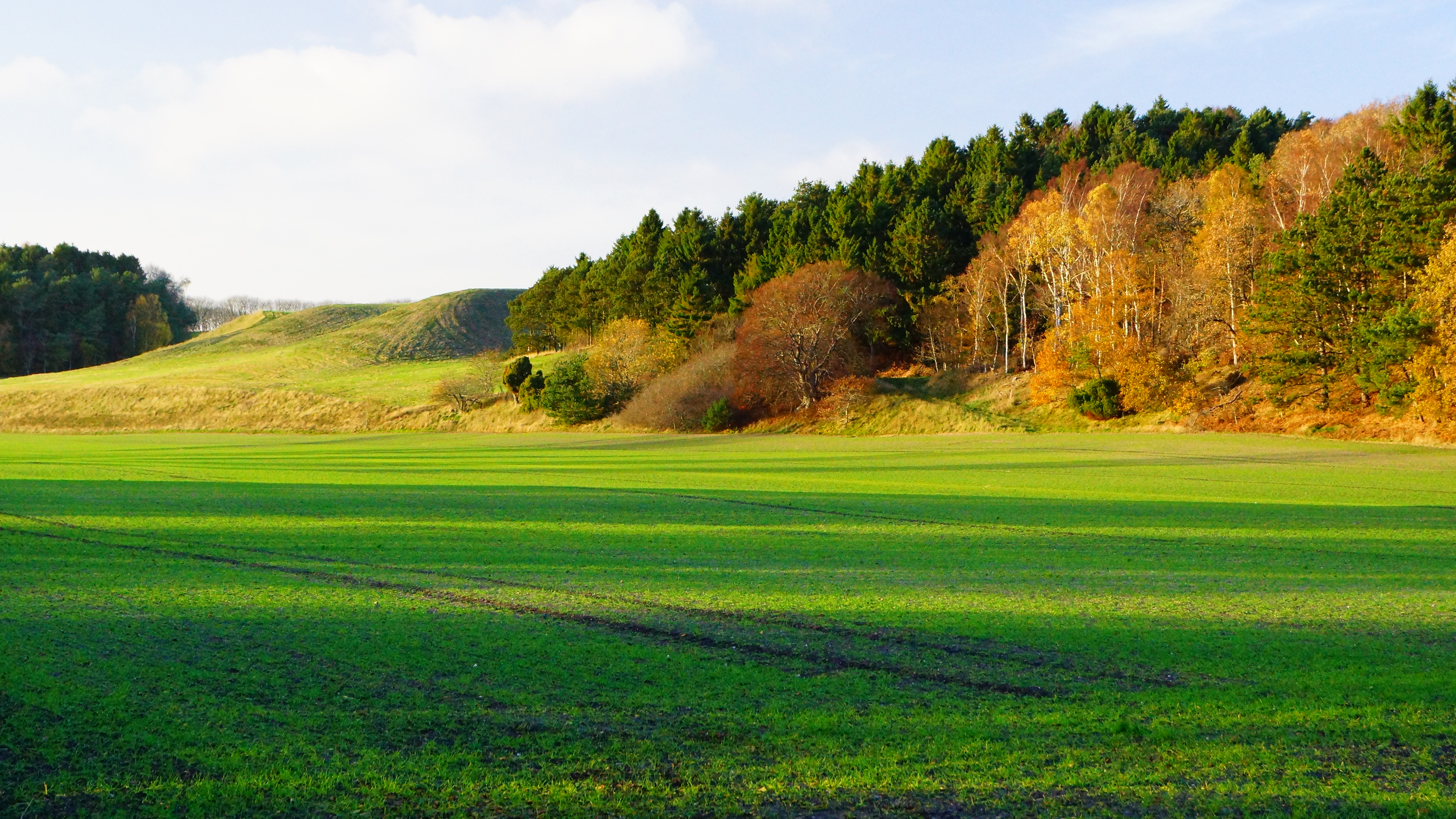 Kolindsund randbakker